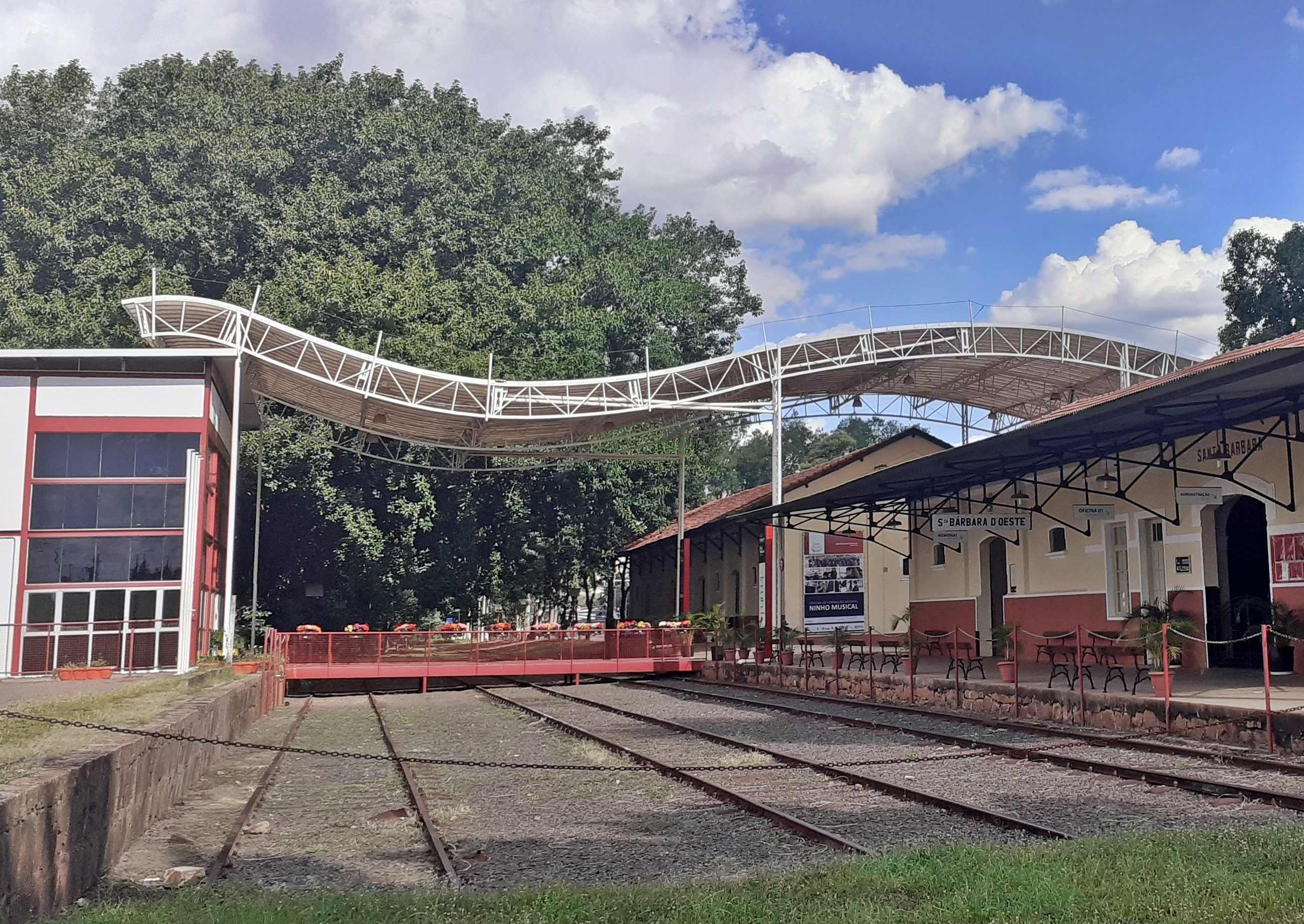 Estação Cultural de Santa Bárbara d'Oeste